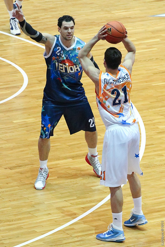 Кристиан Бёрнс, Максим Пустозвонов / Cristian Burns, Maksym Pustozvonov